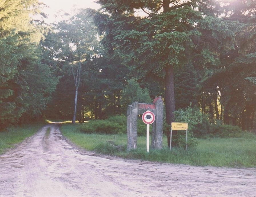 Wüstung Achterberg